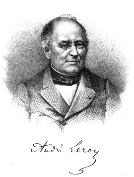 Portrait d'André Leroy. Extrait de "Pomologische Monatshefte" vol.15 - 1869